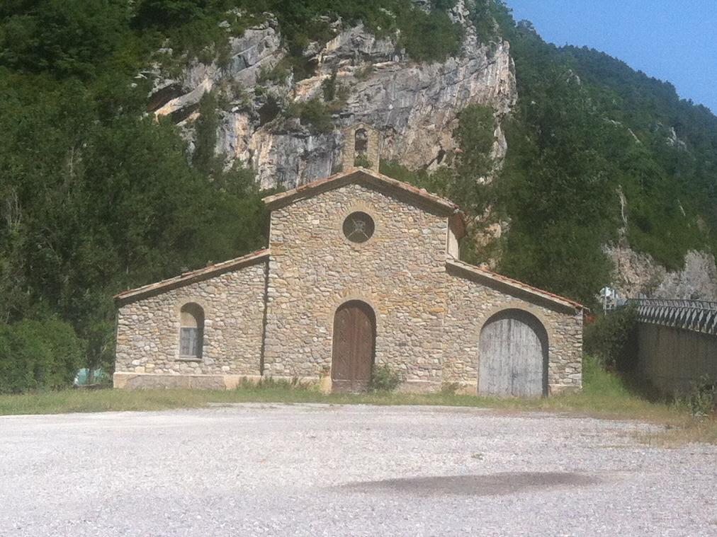 capella de la Mare de Déu del Roser al Balneari Parramon de Ribes de Fresser